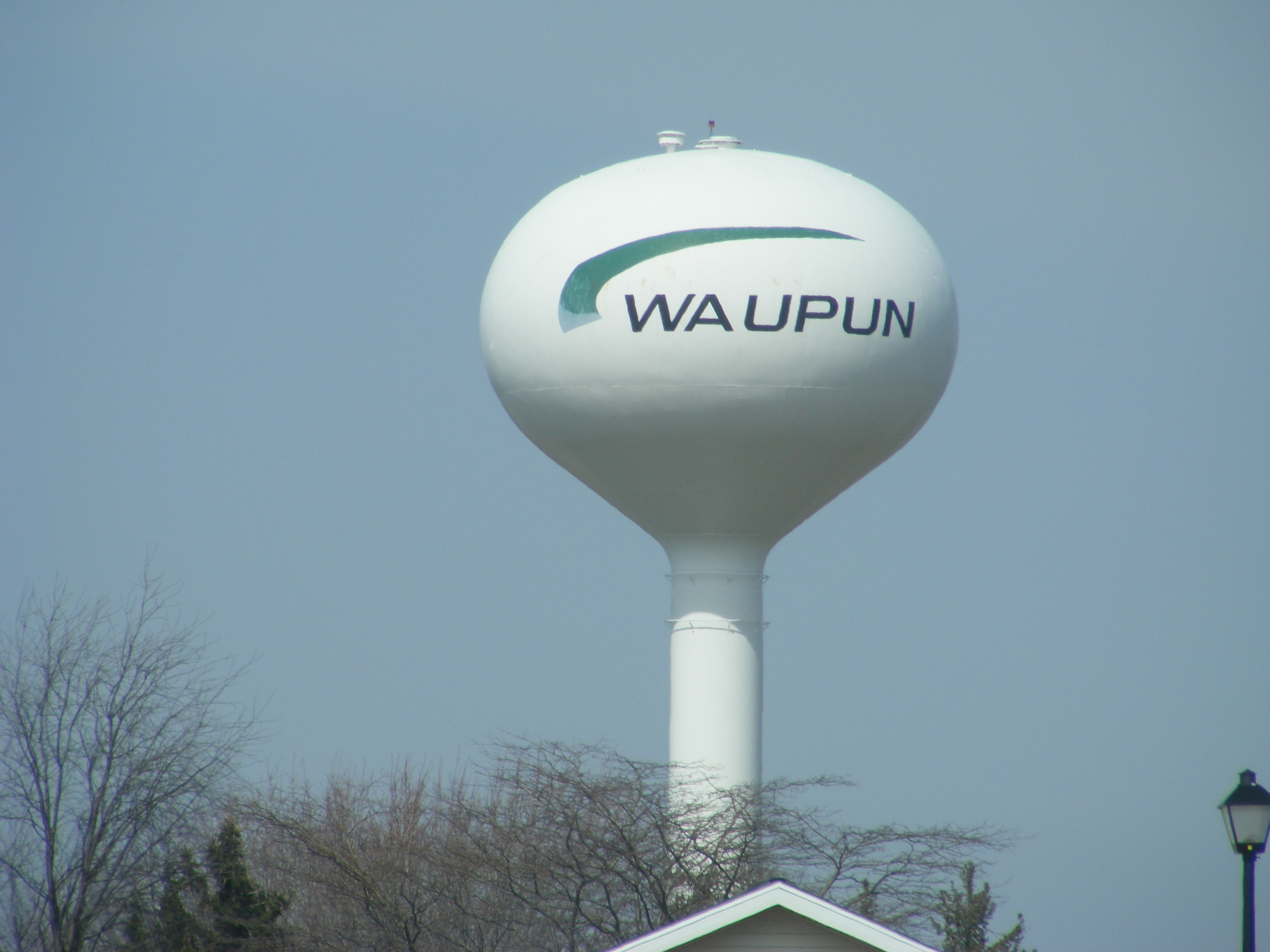 Waupun Tower 2